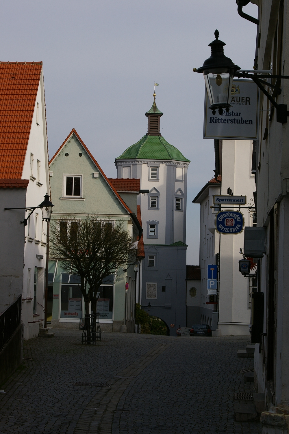 Günzburg, Kühturm in der Altstadt.